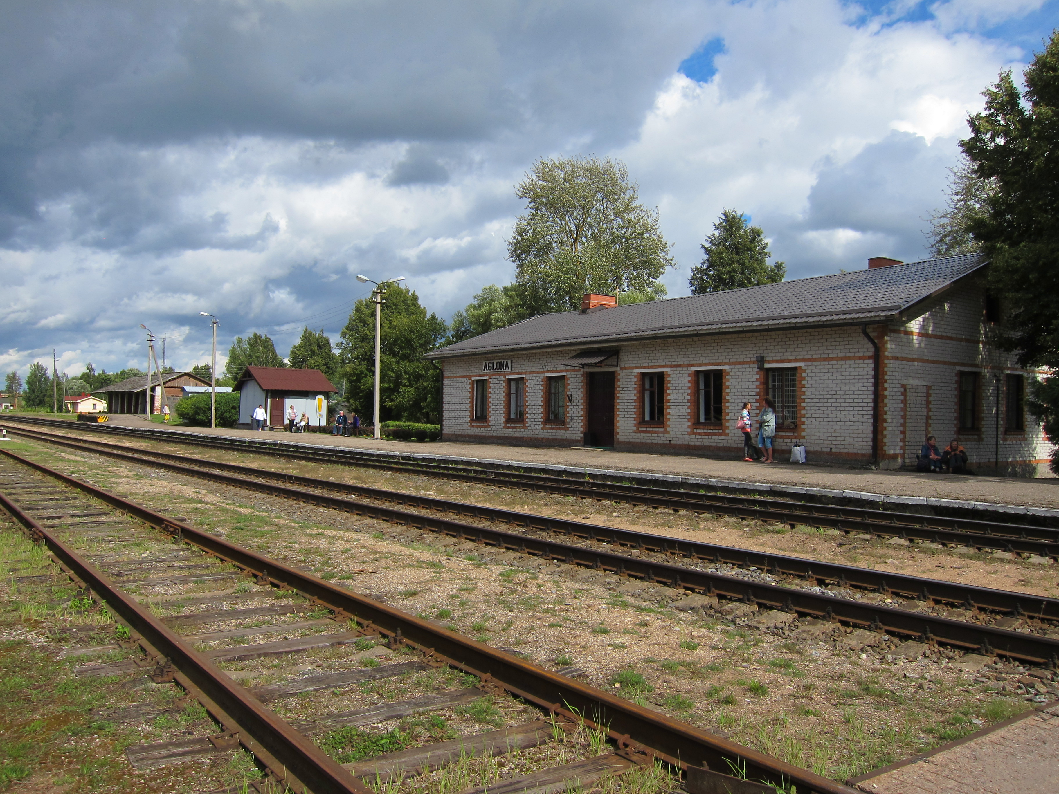 Aglonas stacijas ēka un sliežu ceļi